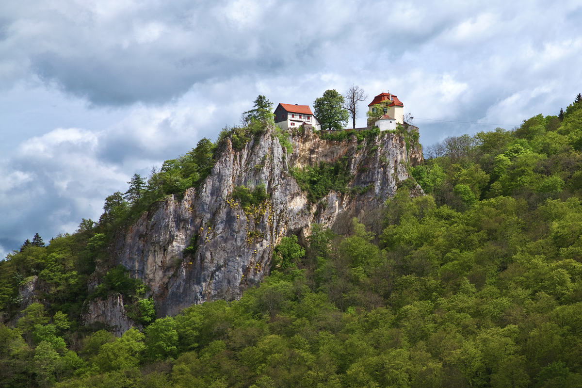 Naturpark Obere Donau: Schloss Bronnen liegt in der Nähe von Fridingen im Oberen Donautal, Baden-Württemberg.